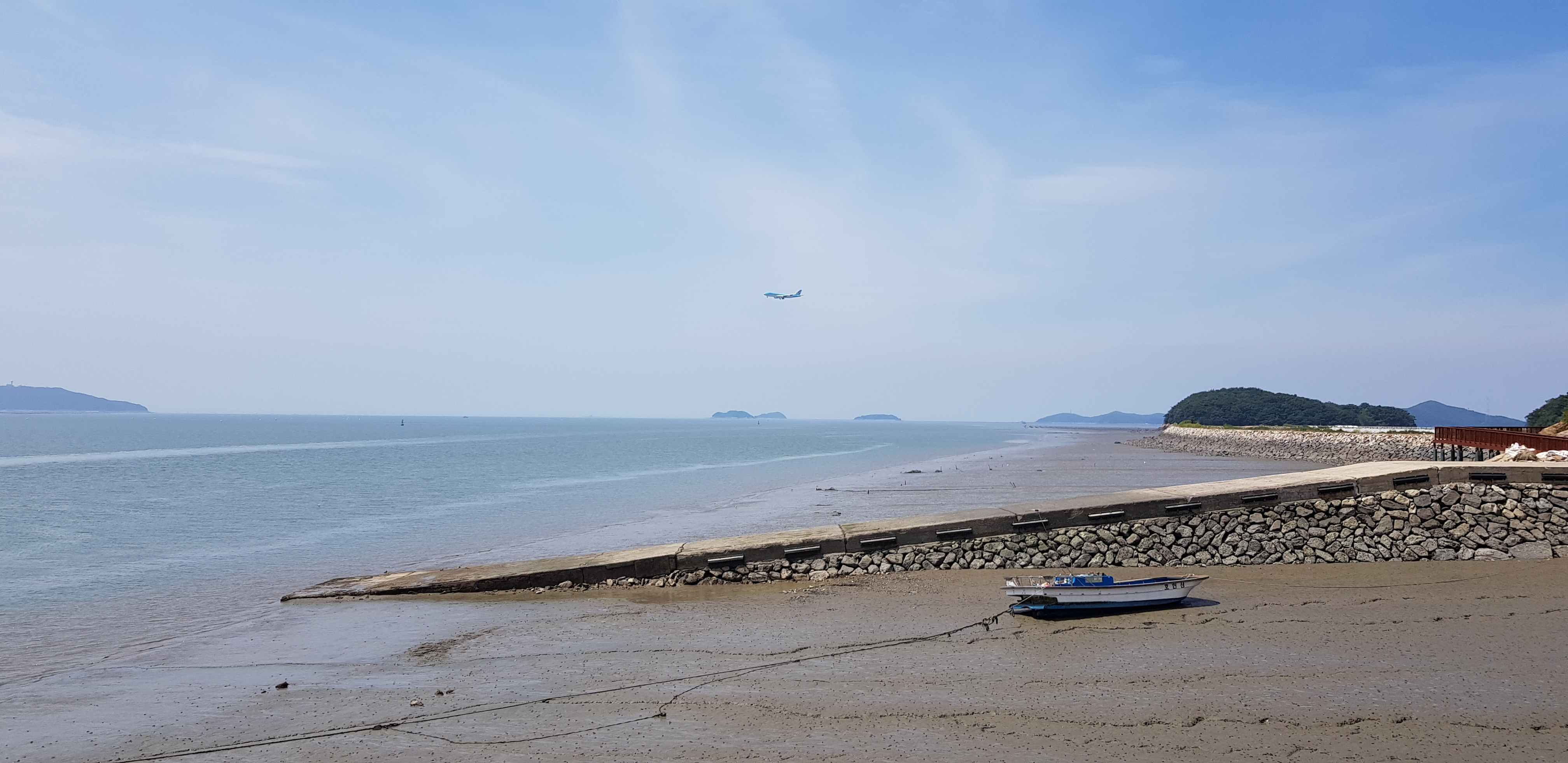 산과 바다가 어우어진 신도앞 바다